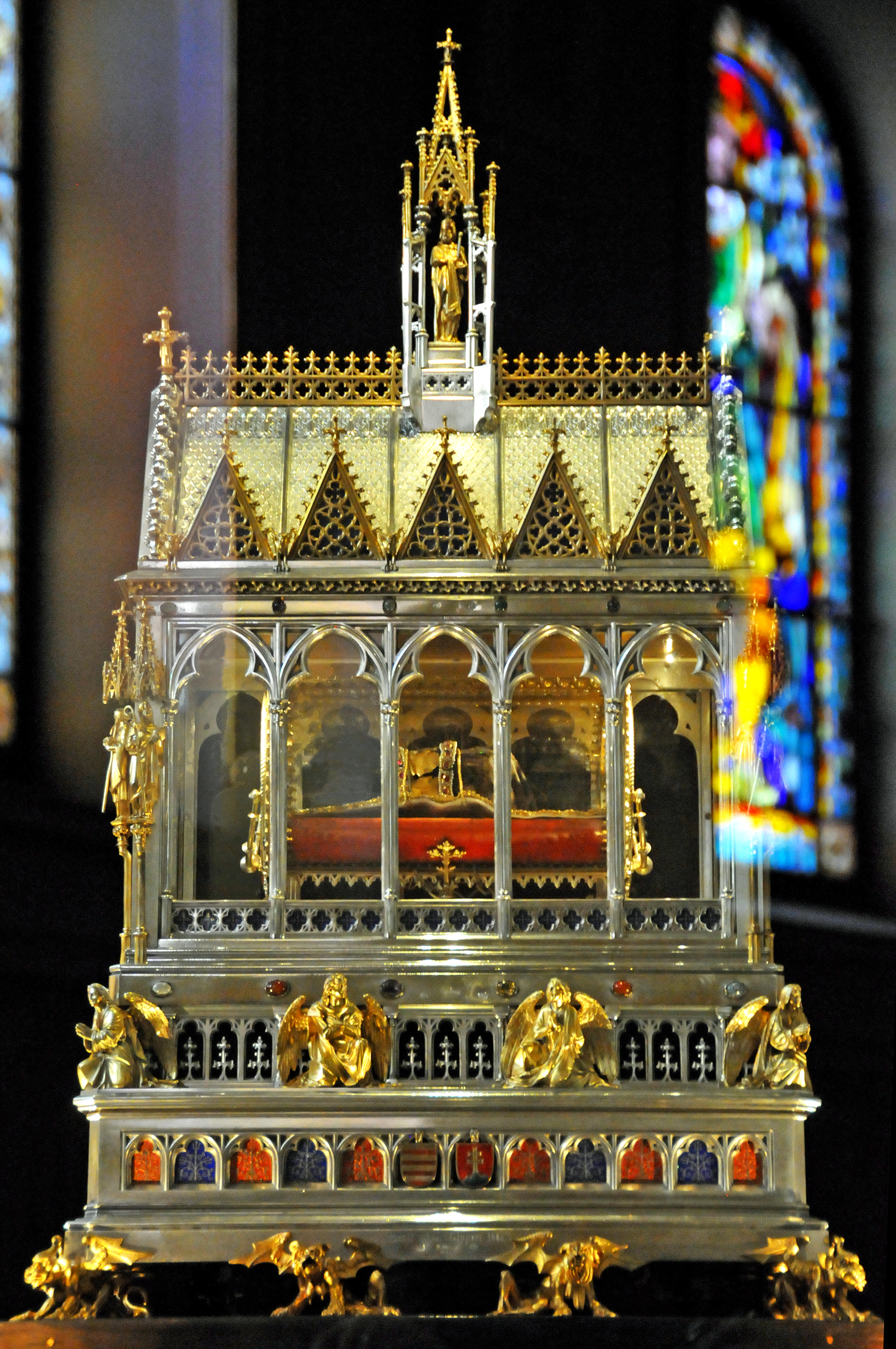 A Szent Jobb a budapesti Szent István-bazilikában.